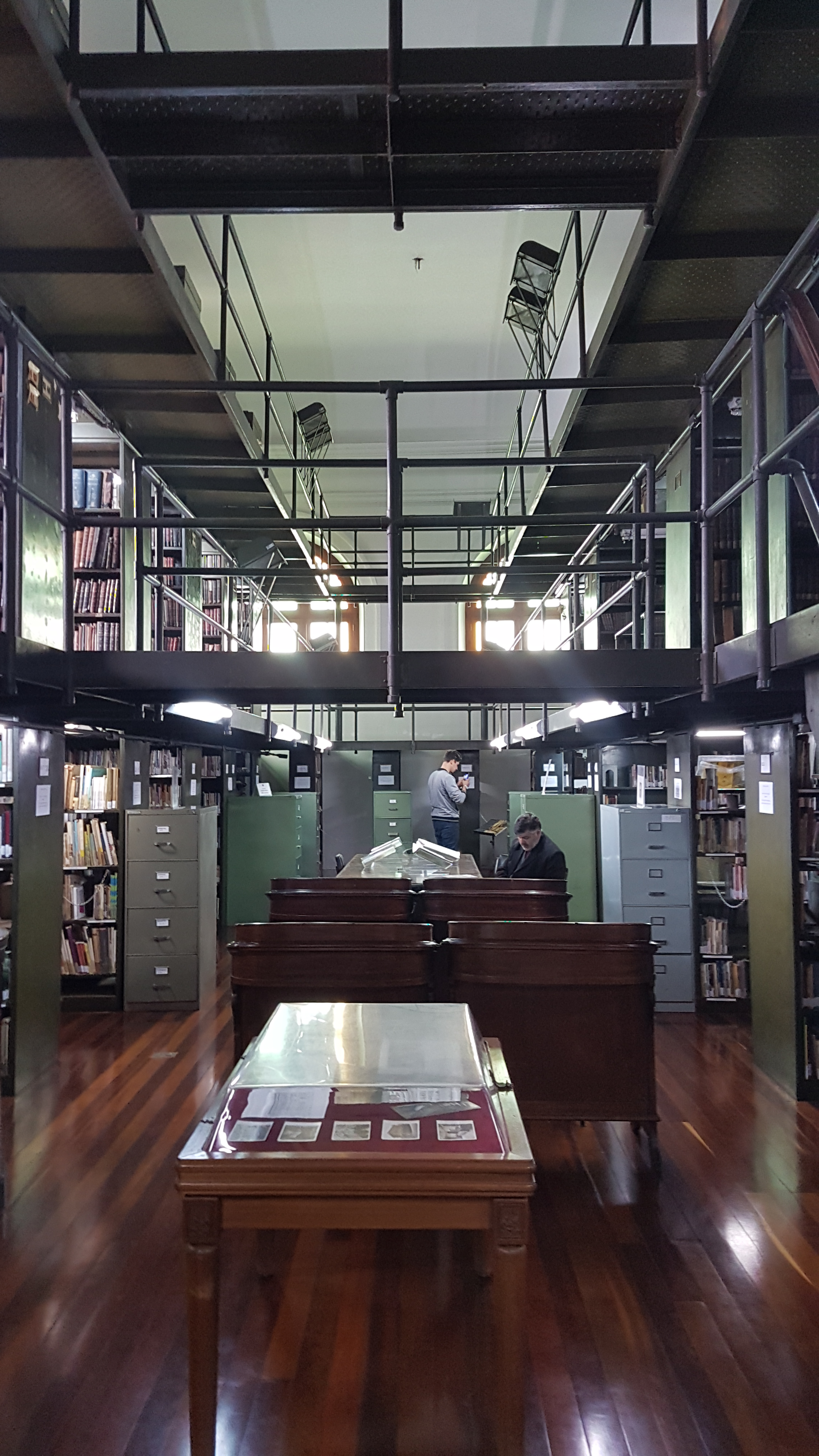 Bem tombado pelo Instituto do Patrimônio Histórico e Artístico do Estado do Rio Grande do Sul na cidade de Porto Alegre Cultural propertyBens Móveis e Integados e o Acervo de Obras (Biblioteca Pública), Porto Alegre, Rio Grande do Sul, Brazil Q65970979, P727